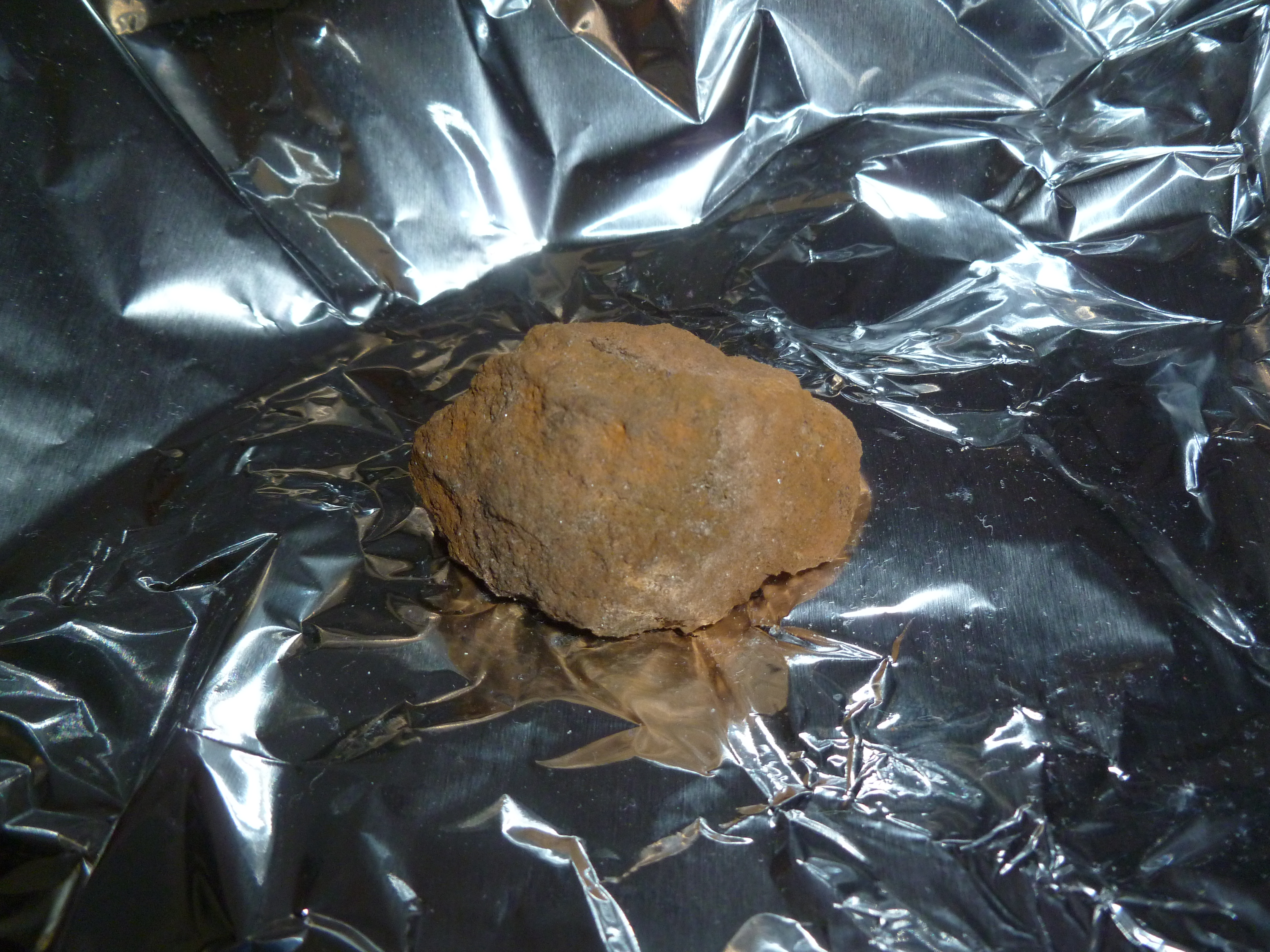 Brauneisenstein aus dem Rochus in Ibbenbüren. Gefunden am 16.04.2013 im Rochus in der nähe der ehemaligen Tagebaue.